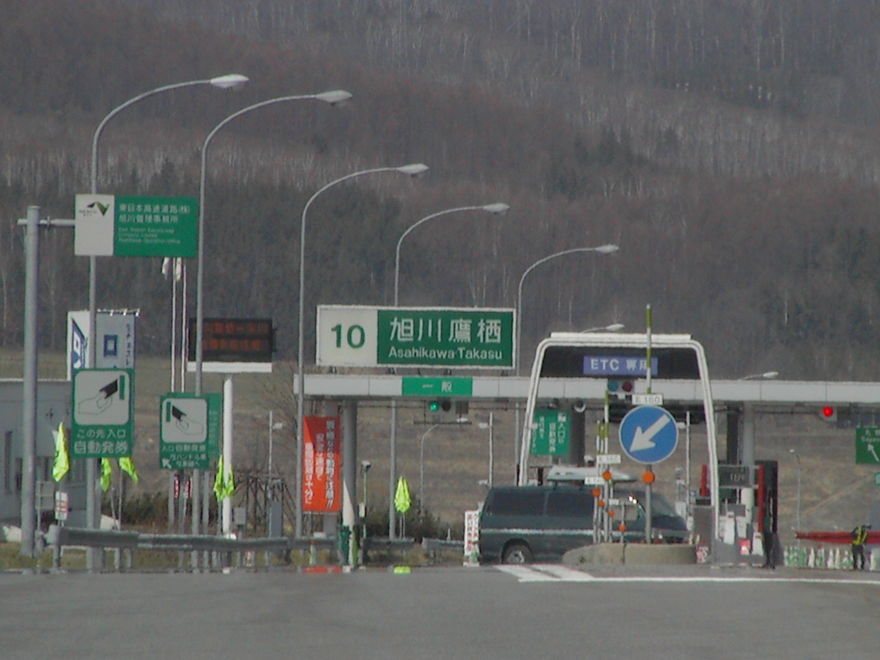 旭川鷹栖IC料金所（入口）